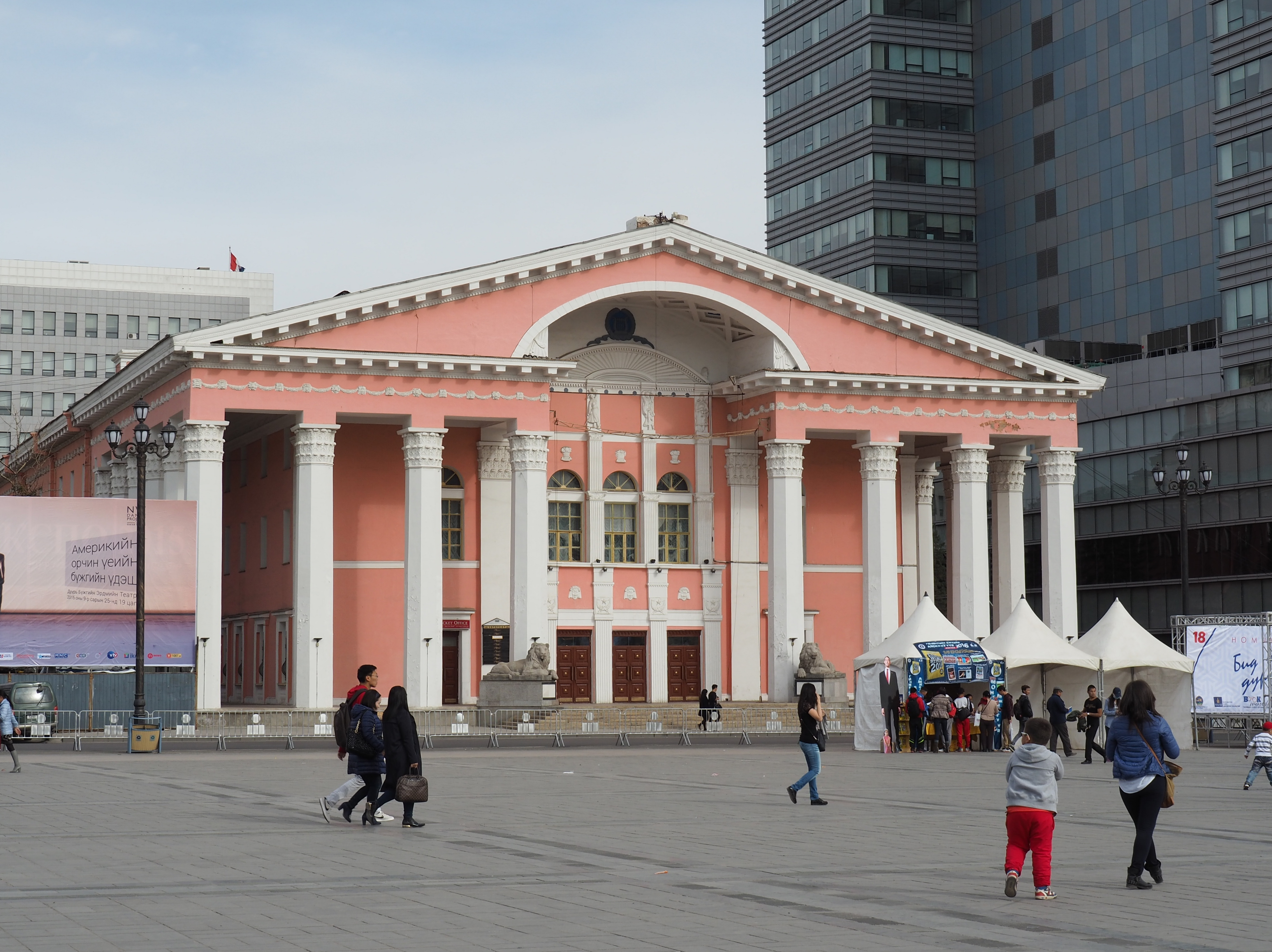 Ulaanbaatar